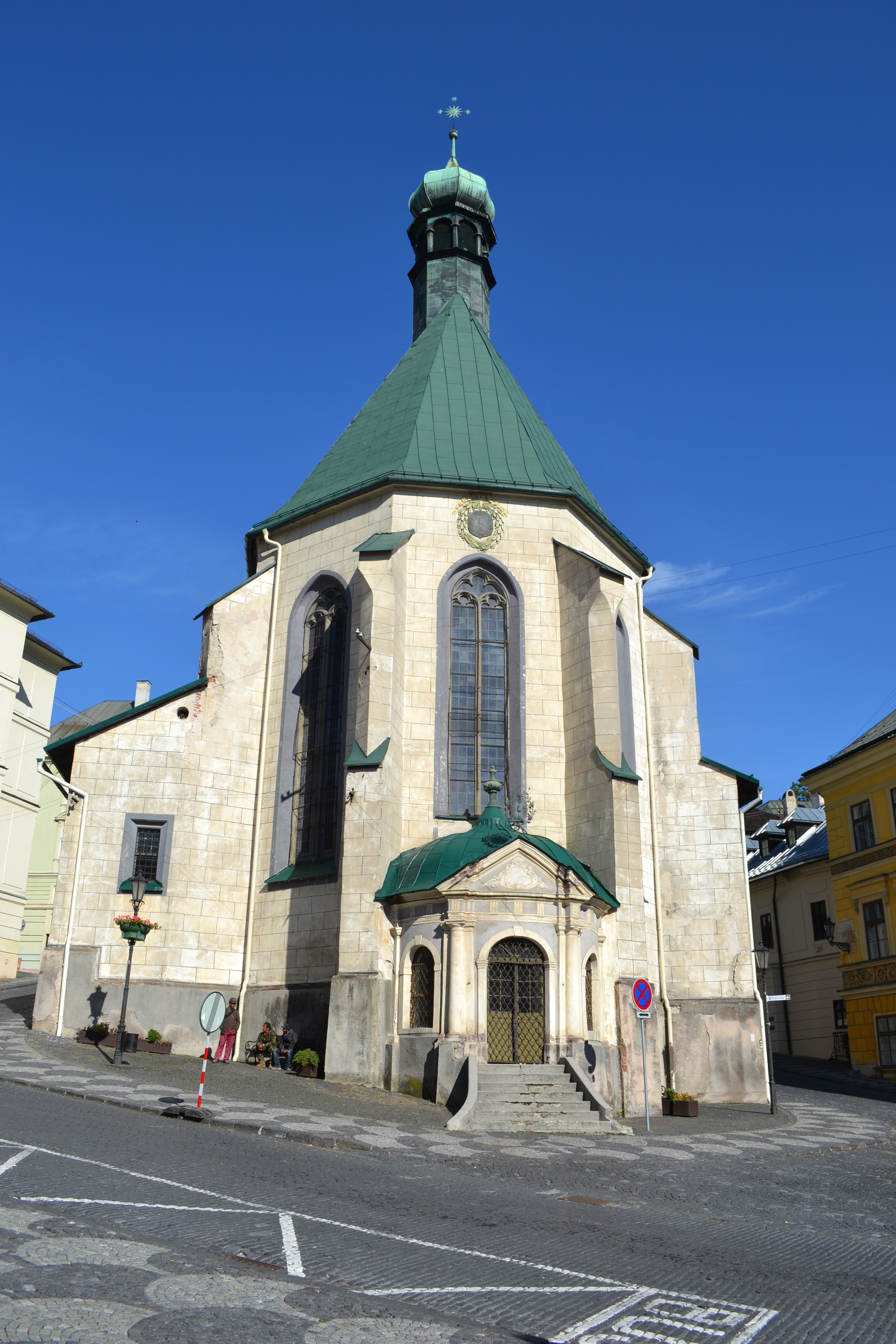 Kostol svätej Kataríny v Banskej Štiavnici